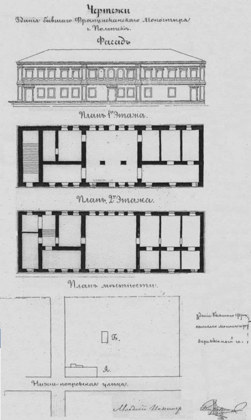 Беларуская (тарашкевіца): Полацак (Połacak), вуліца Вялікая (vulica Vialikaja). Кляштар францішканаў